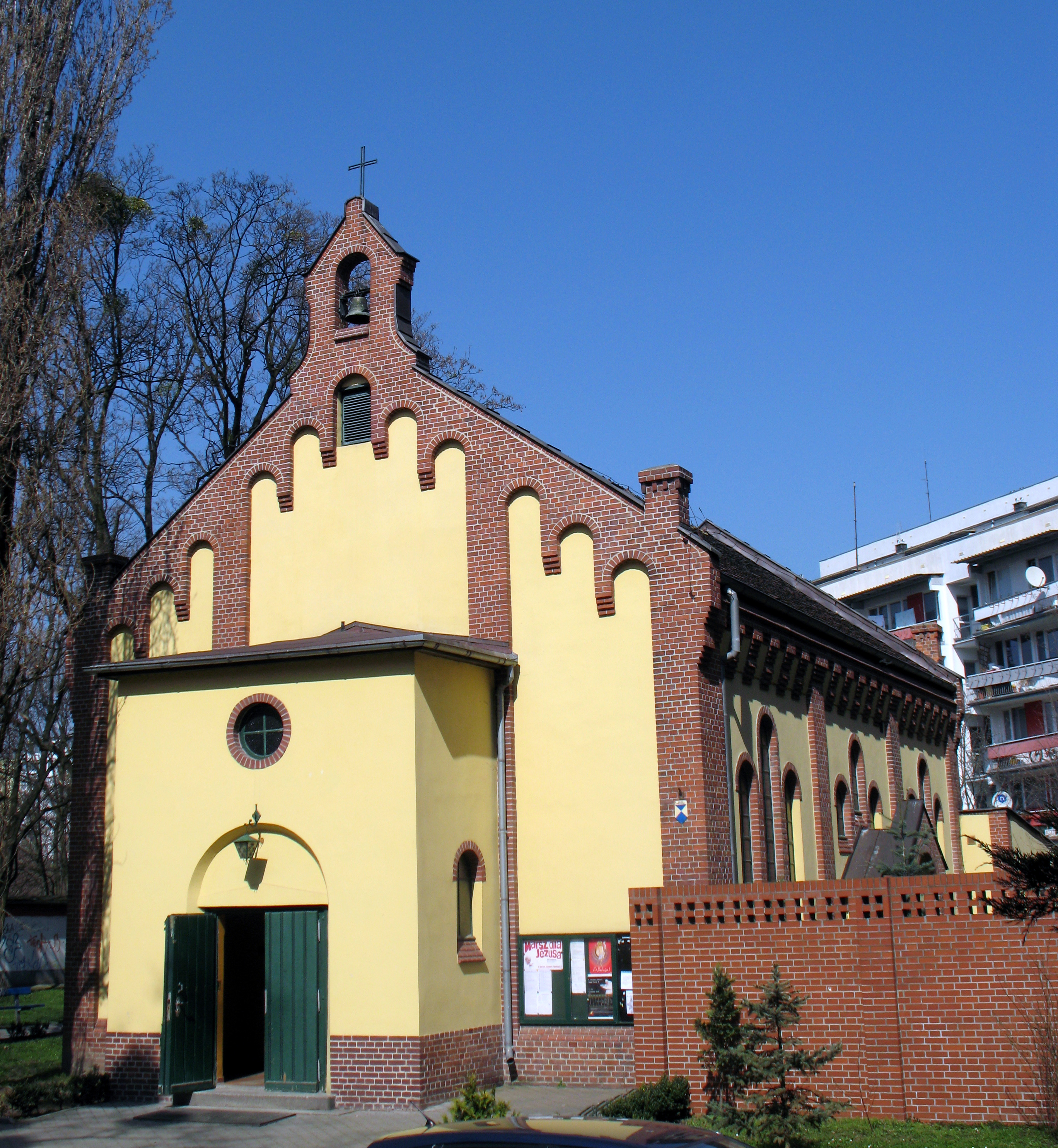 Wrocław, kościół św. Jerzego. Dawniej parafialny. ul. Ojców Oblatów, Popowice